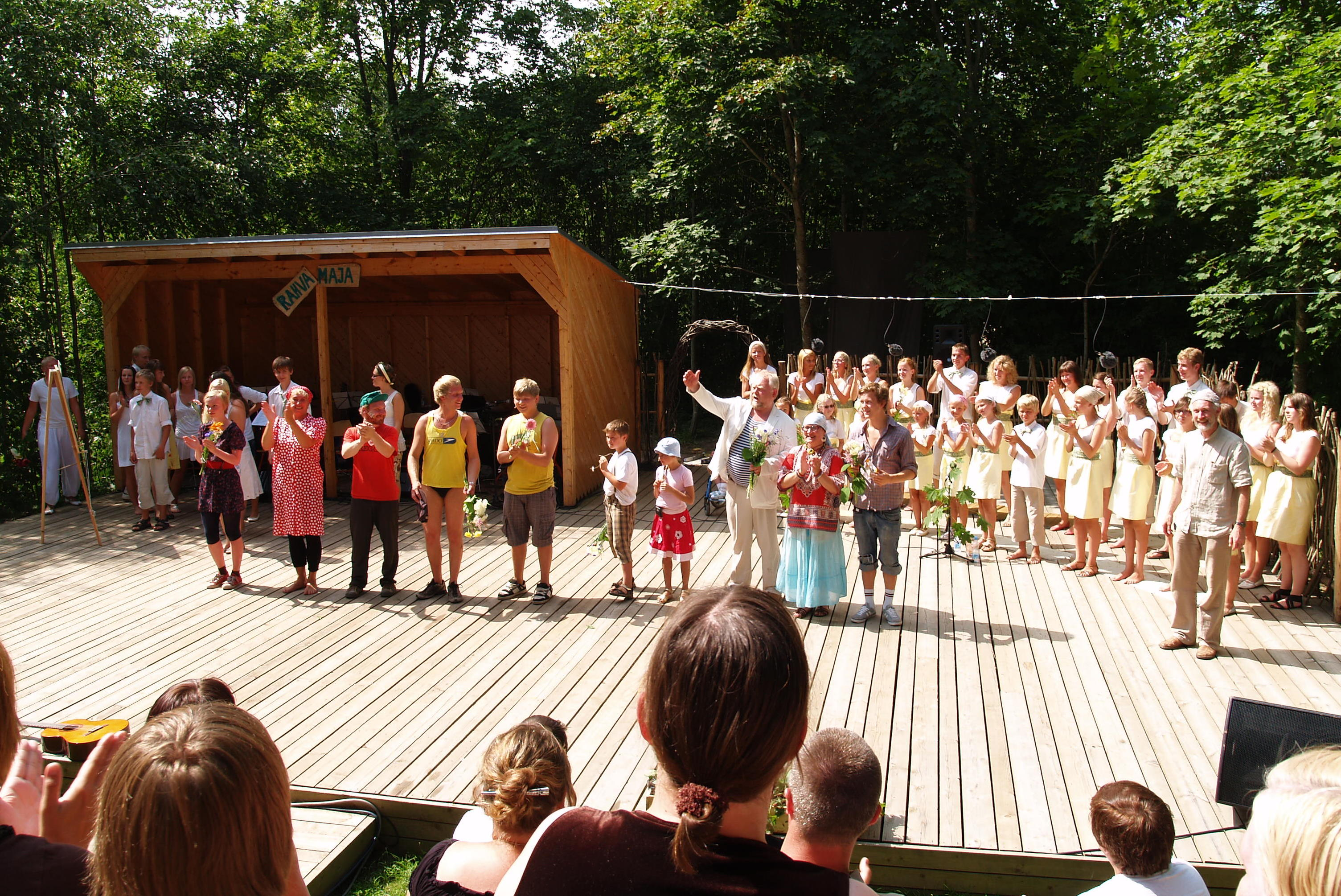 Noortemuusikal Suvevärvid Kose Noortelaval.